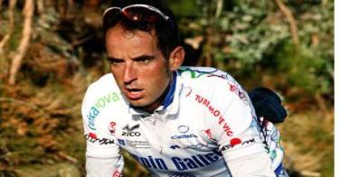 Unha foto do ciclista Ezequiel Mosquera